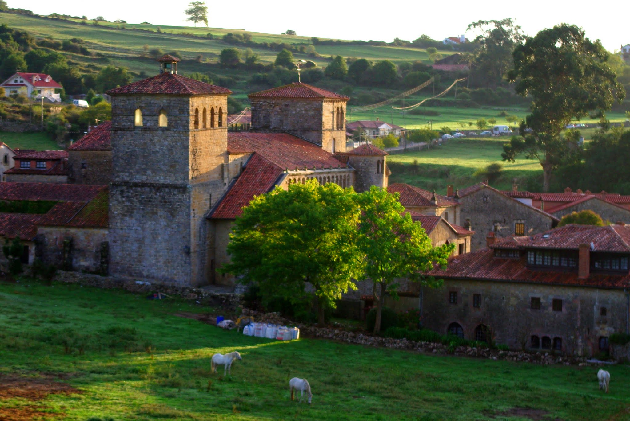 Santillana del Mar